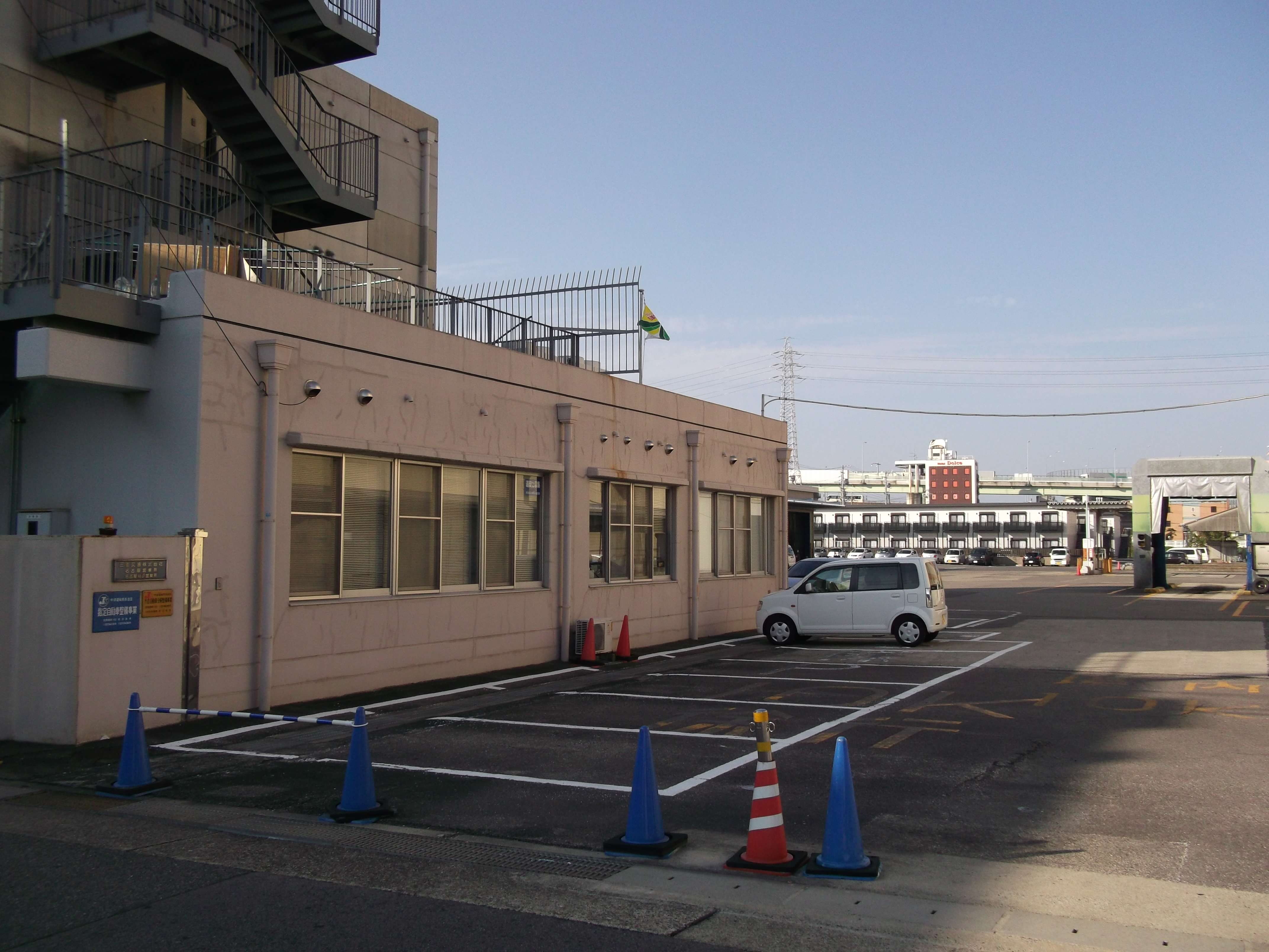 名古屋市北区玄馬町の三重交通名古屋営業所を南側から写す